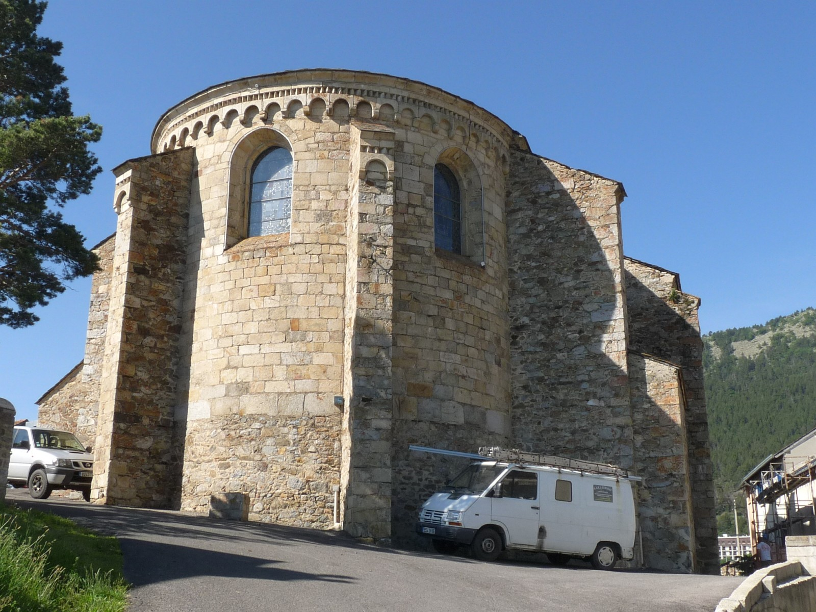 Eglise des Angles, Pyrénées-Orientales, France